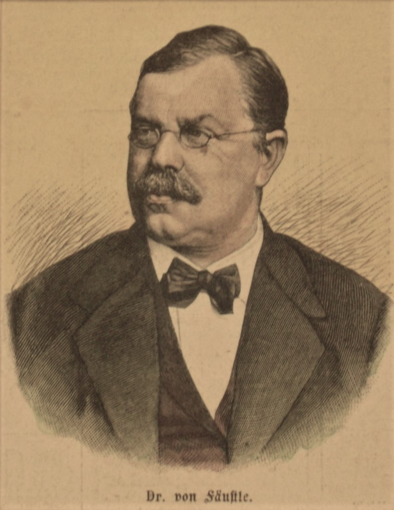 Johann Nepomuk von Fäustle, kgl. bayr. Justizminister, kolorierter Holzstich; 11 x 9 cm